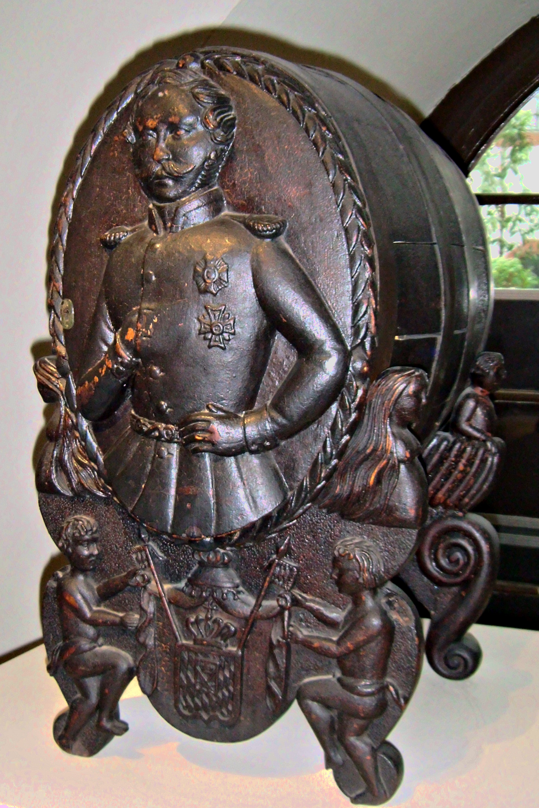 Prunkfässchen des Küfermeisters Melchior Röhm aus Sommerach für König Max II. von Bayern, Historisches Museum der Pfalz, Speyer